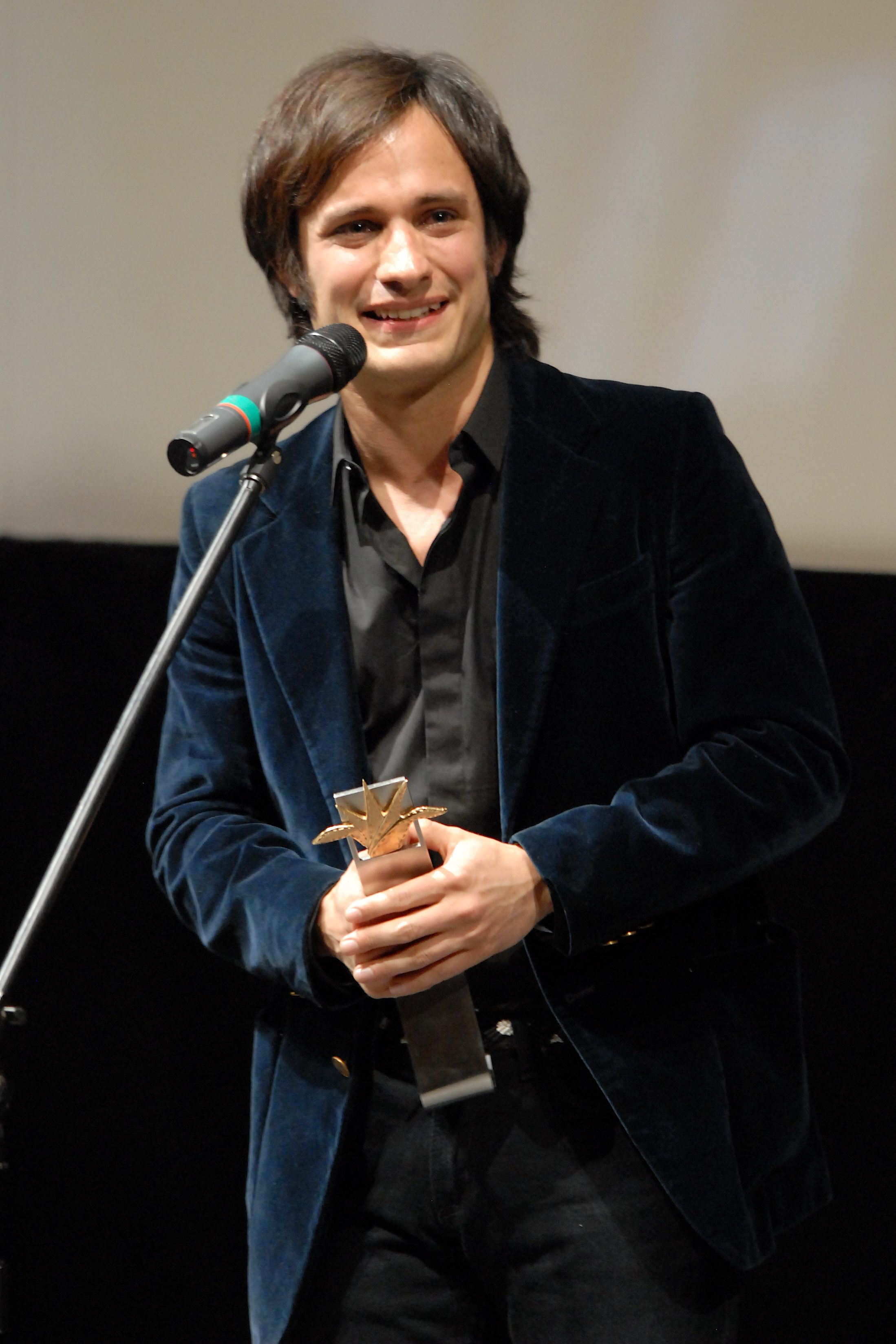 20/03/09 El actor Gael García Bernal quien recibió el Mayahuel de Plata por su trayectoria, se mostró emocionado y sorprendido por el premio, agradeció y dedicó el premio a su abuela, quien estuvo presente en la ceremonia.